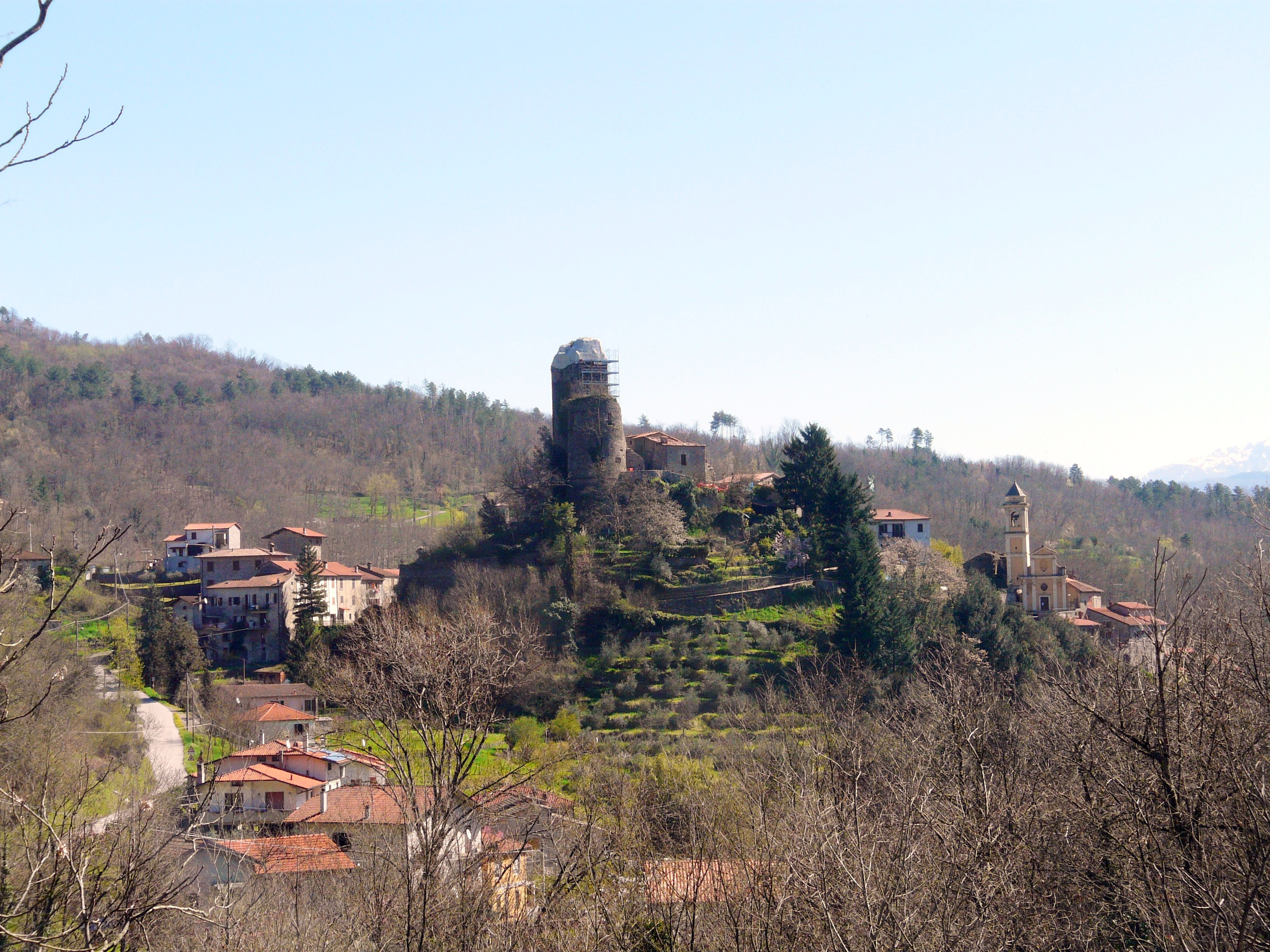 Panorama di Tresana, Toscana, Italia